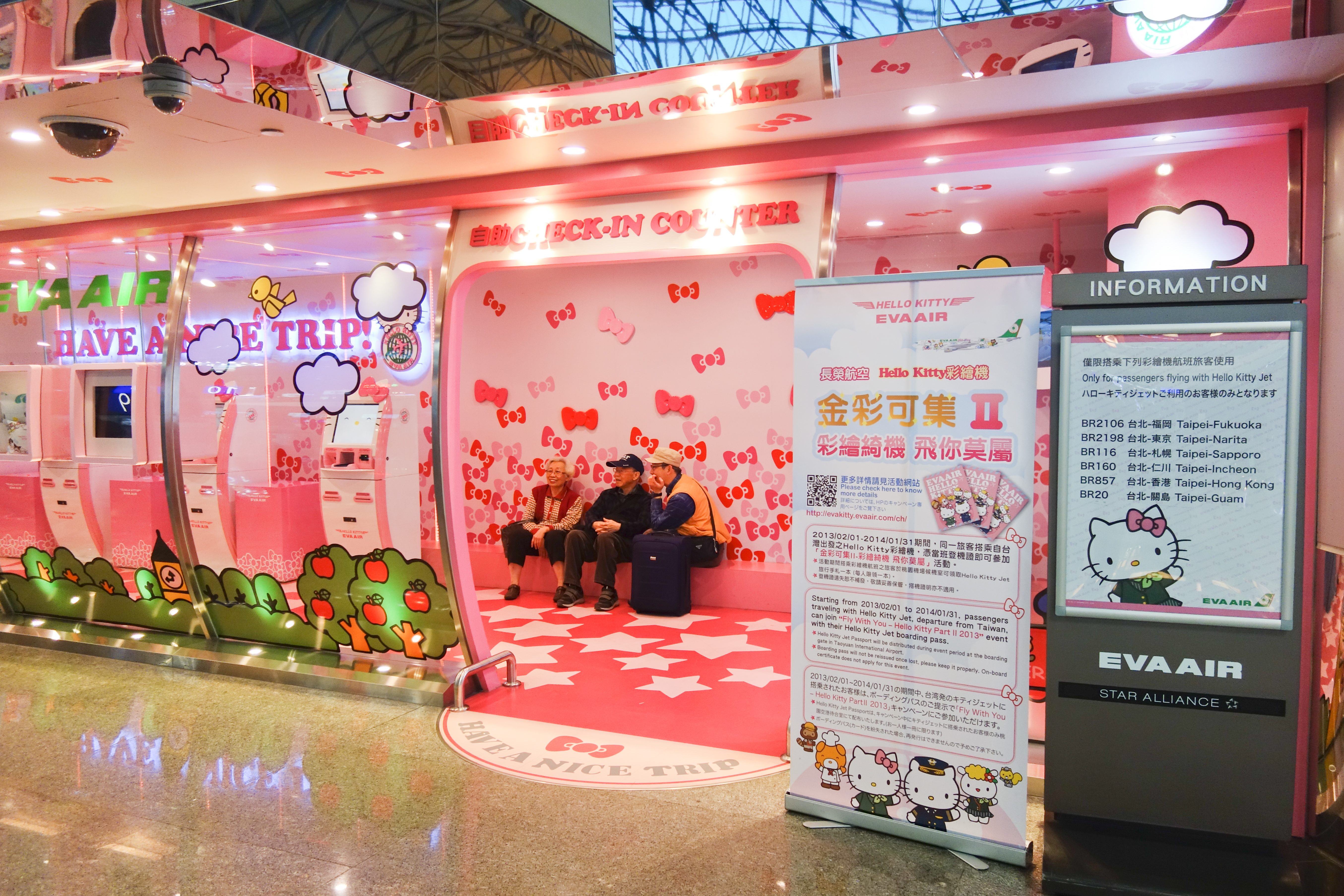 ハローキティ チェックインカウンター（桃園国際空港第2ターミナル）